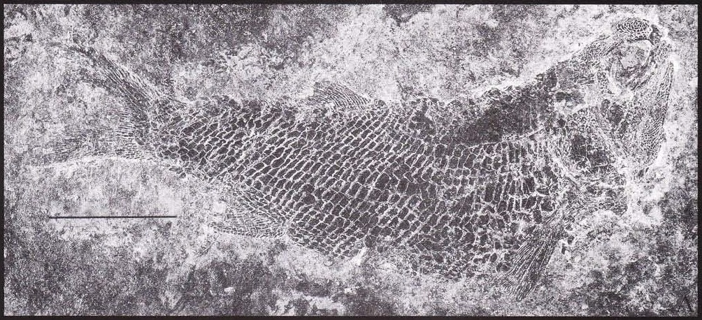 Caelatichthys nitens gen. n., sp. n: MCSNIO P561, the holotype; Scale bars: 10 mm